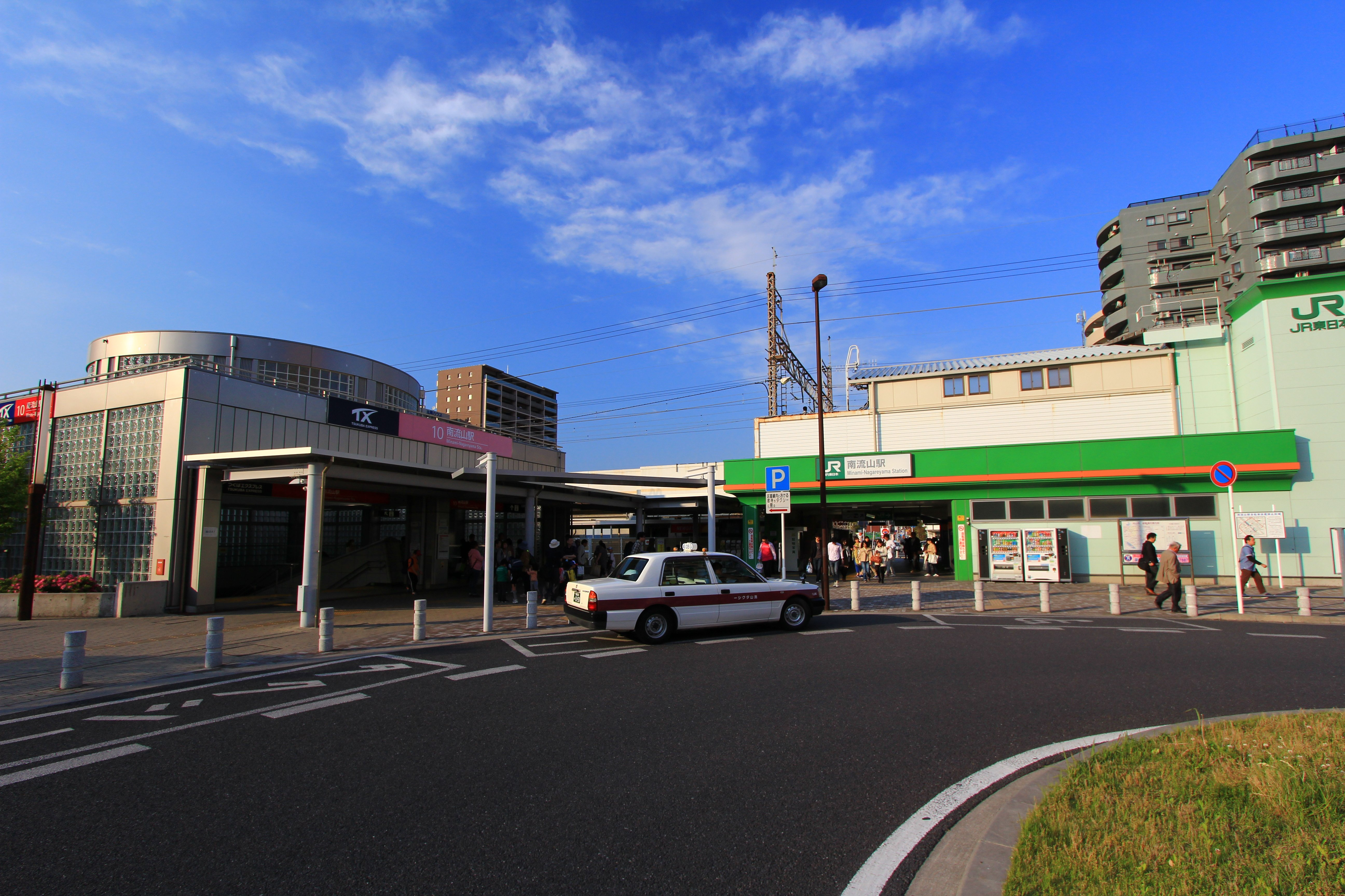 南流山駅